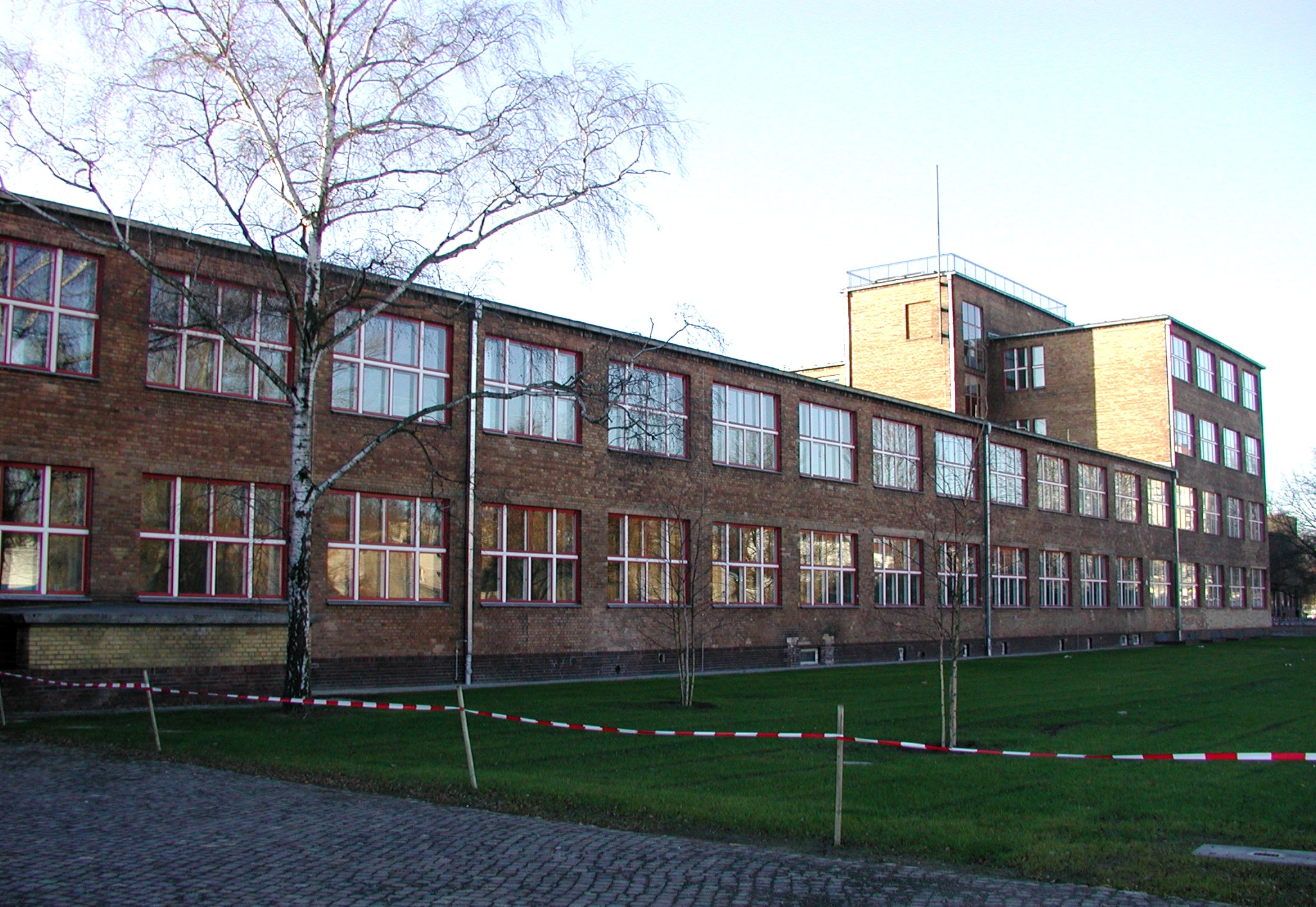 Ein Flügel der Max-Taut-Schule